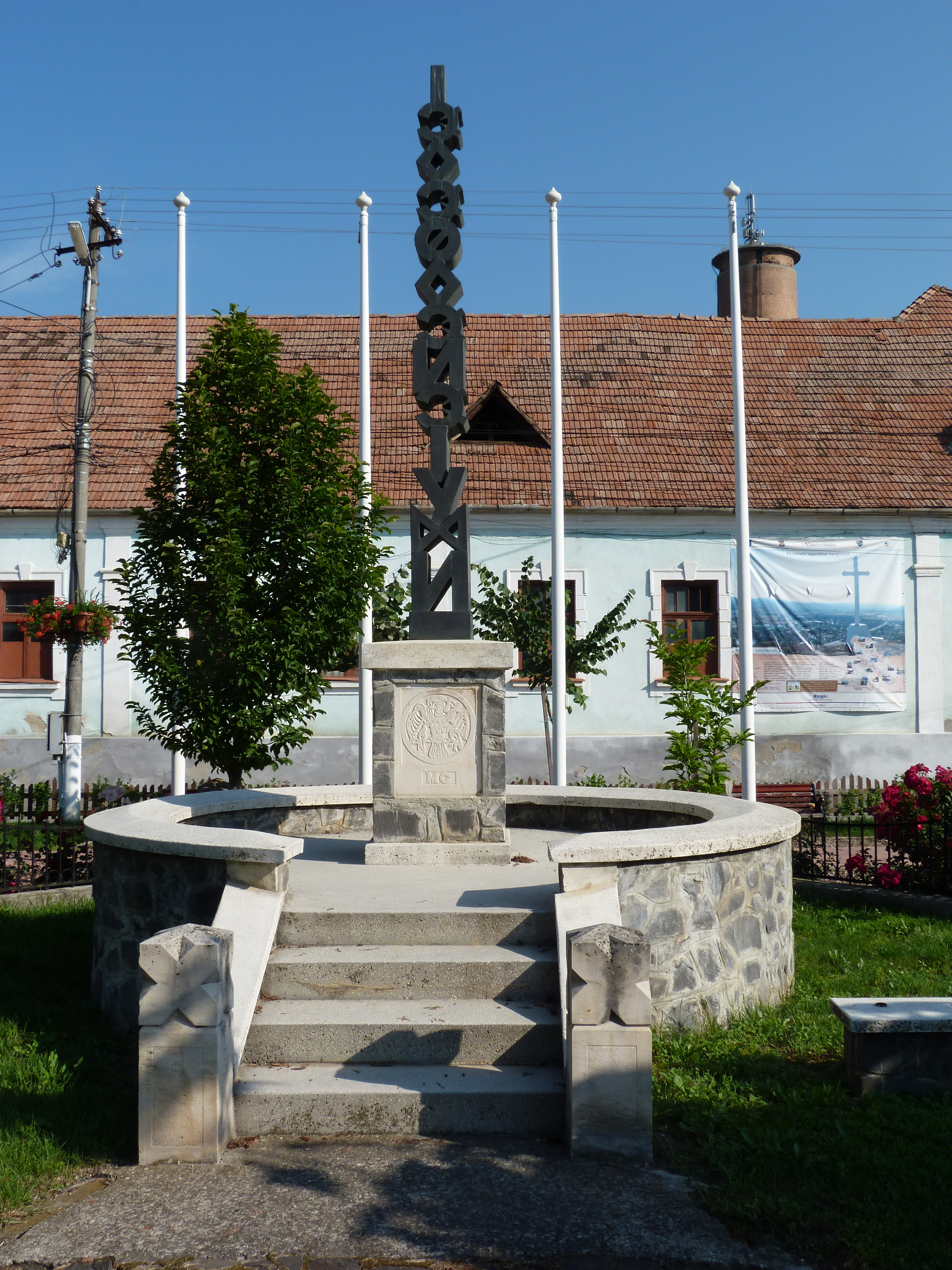 A felvétel 2013. június hó 19 -én készült Székelykeresztúron, a főtéren. A Magyar Írás emlékműve. A világ első írás emlékműve. ©© Derzsi Elekes Andor, Budapest, 2013, You are authorised to use these photos and vids under Creative Commons – even for commercial, for profit purposes. Photos must be attributed to Derzsi Elekes Andor. All of the photos and vids in the Metapolisz DVD line are under Creative Commons and can be used even for commercial – for profit – purposes. Recommended Citation Derzsi Elekes Andor: Metapolisz DVD line